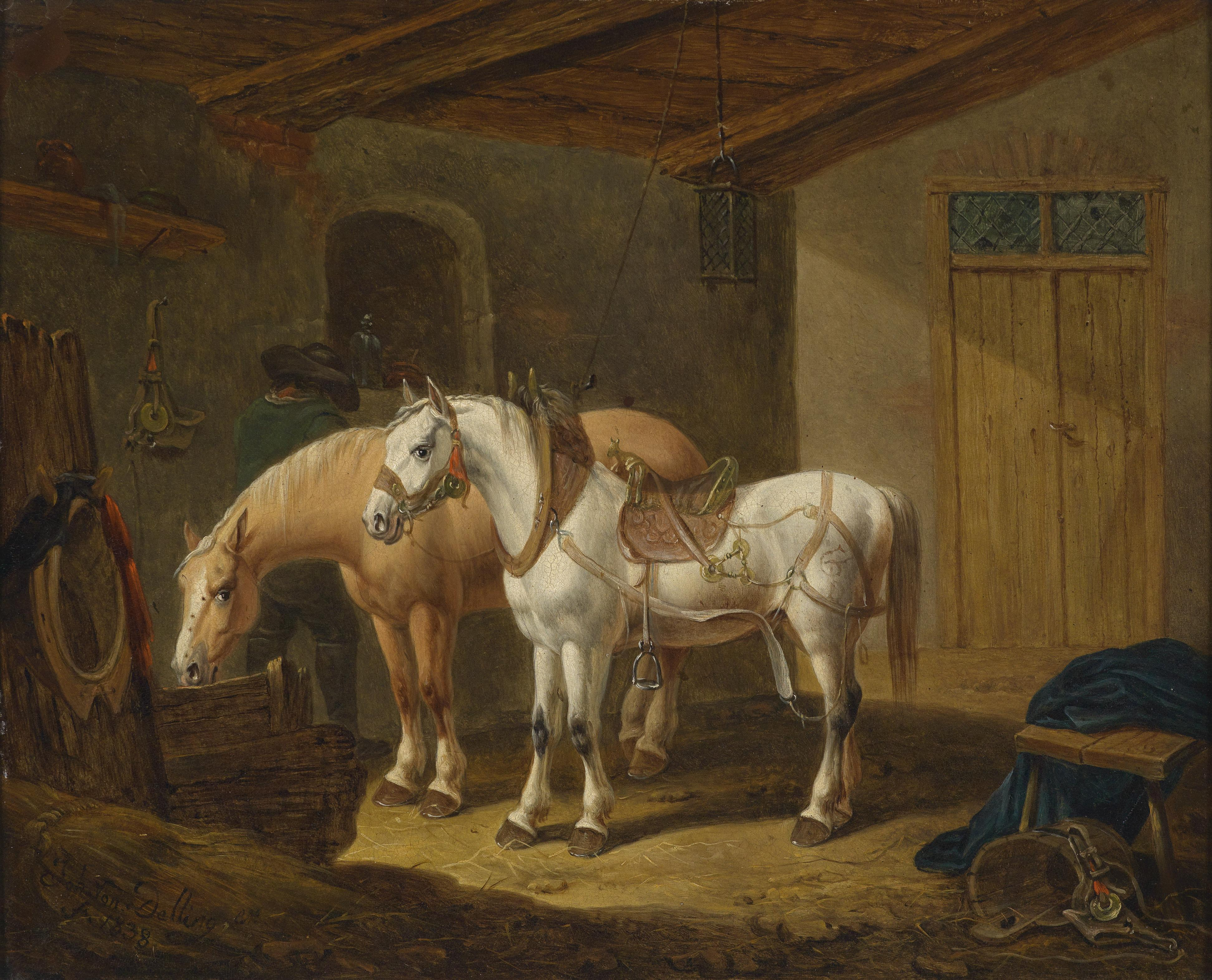 Pferde im Stall, signiert, datiert Joh. von Dallinger f. 1838, Öl auf Kupfer, 23,5 x 29,5 cm